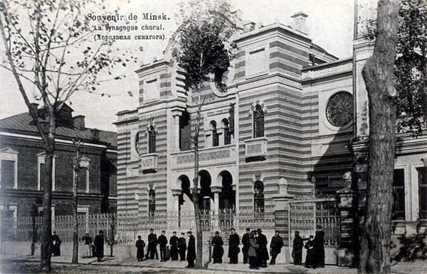 Харальная сінагога. Фота з архіва Сміловіцкага Л.Л., доктара гістарычных навук, ст. навуковага супрацоўніка Центра па вывучэнні яўрэйскай дыяспары пры Тэль-Авіўскім універсітэце.